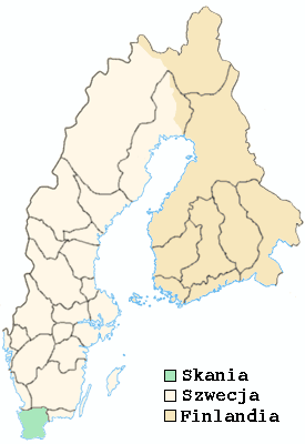 mapka Skanii